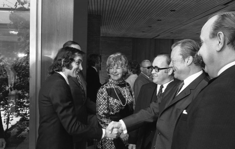 Bundeskanzler Willy Brandt empfängt Filmschauspieler